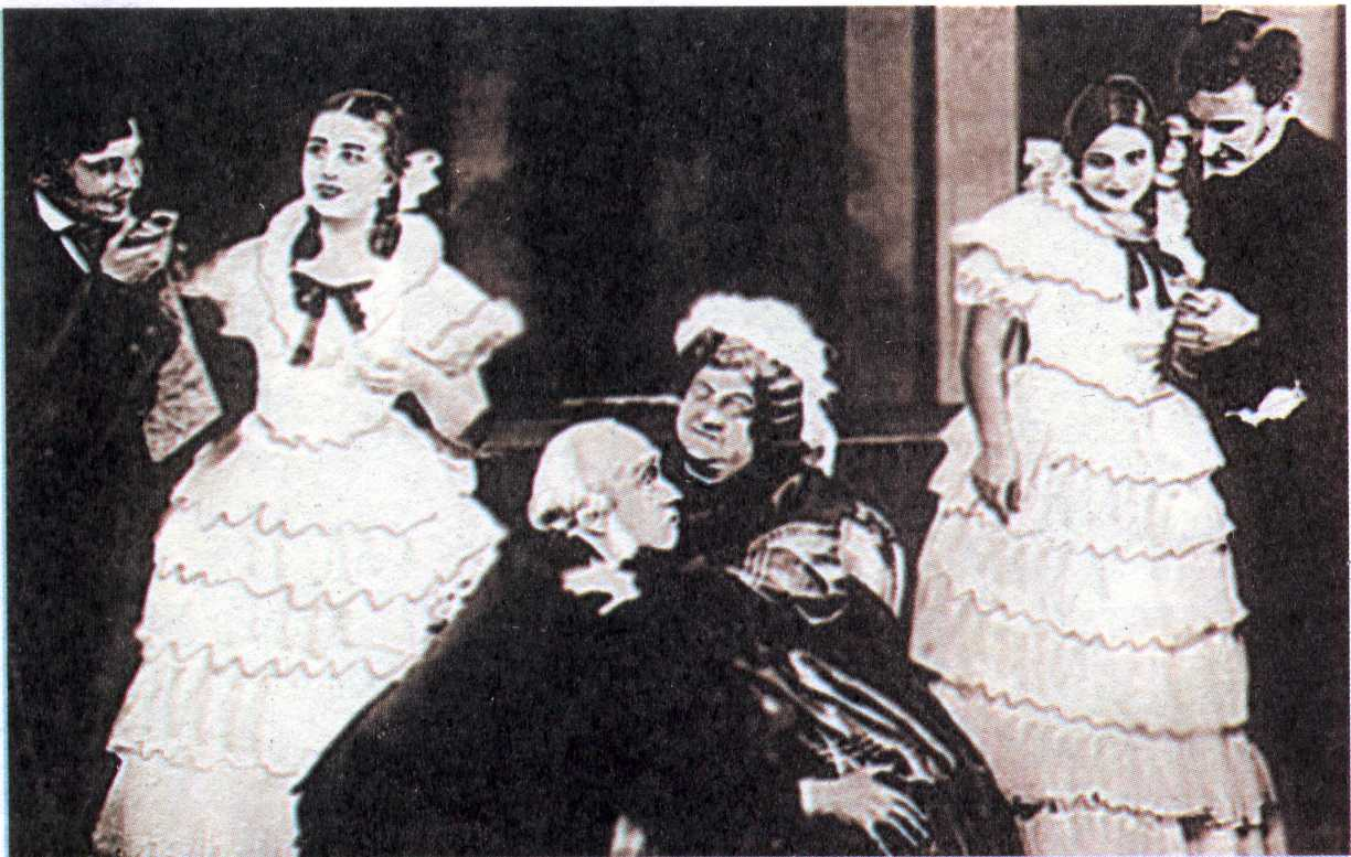 Беларуская (тарашкевіца): Сцэна з спэктаклю «Даходнае месца» Аляксандра Астроўскага